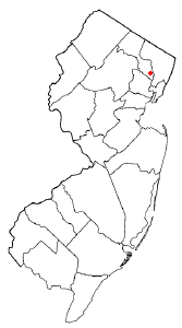 Karte des US-Bundesstaates New Jersey, unterteilt nach Counties, Stadt Clifton hervorgehobenLizenzstatus: GNU-FDL